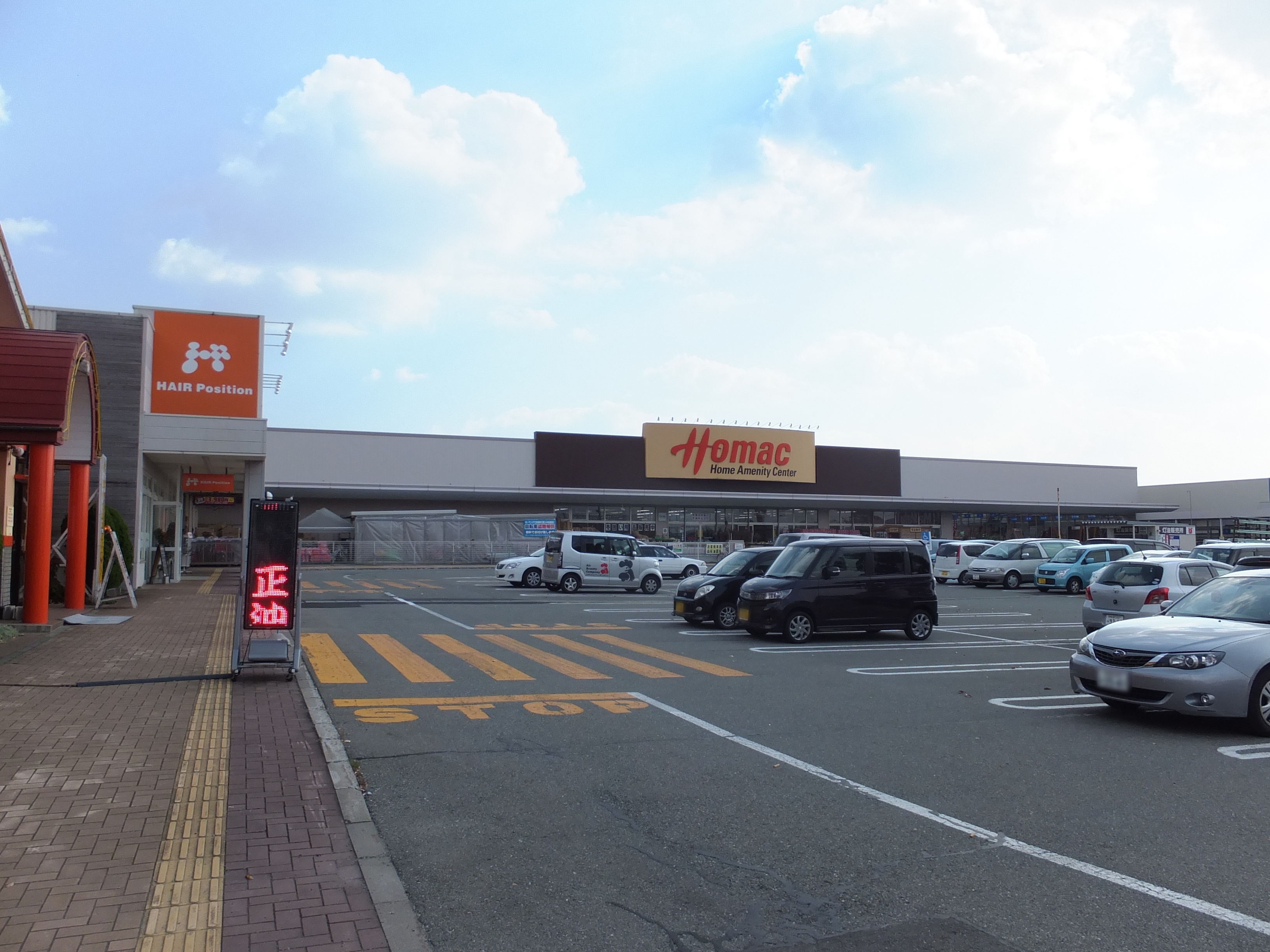 イオンタウン茨島パワーセンター内、ホーマック茨島店（秋田市茨島）